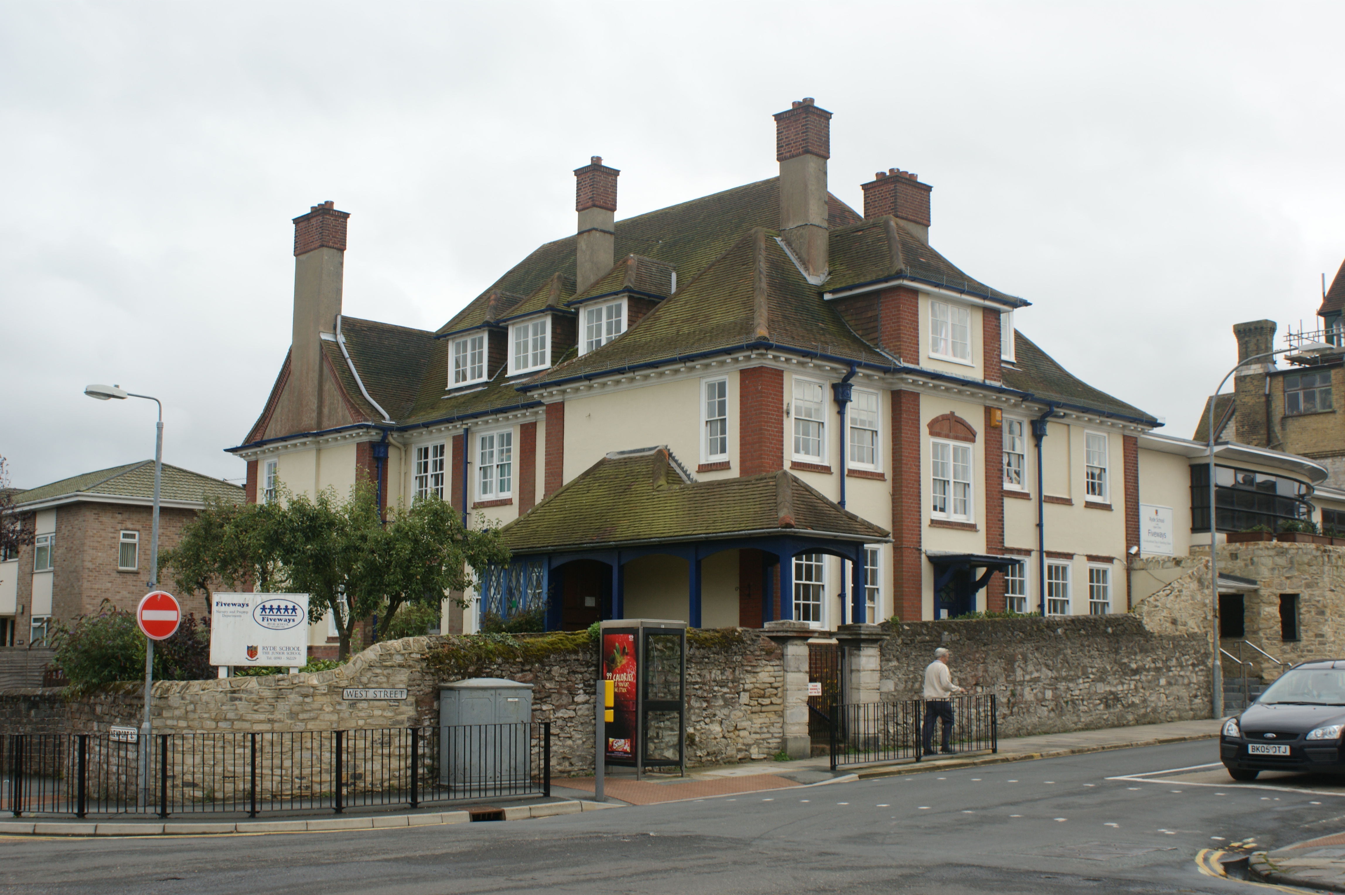 Fiveways in Ryde.